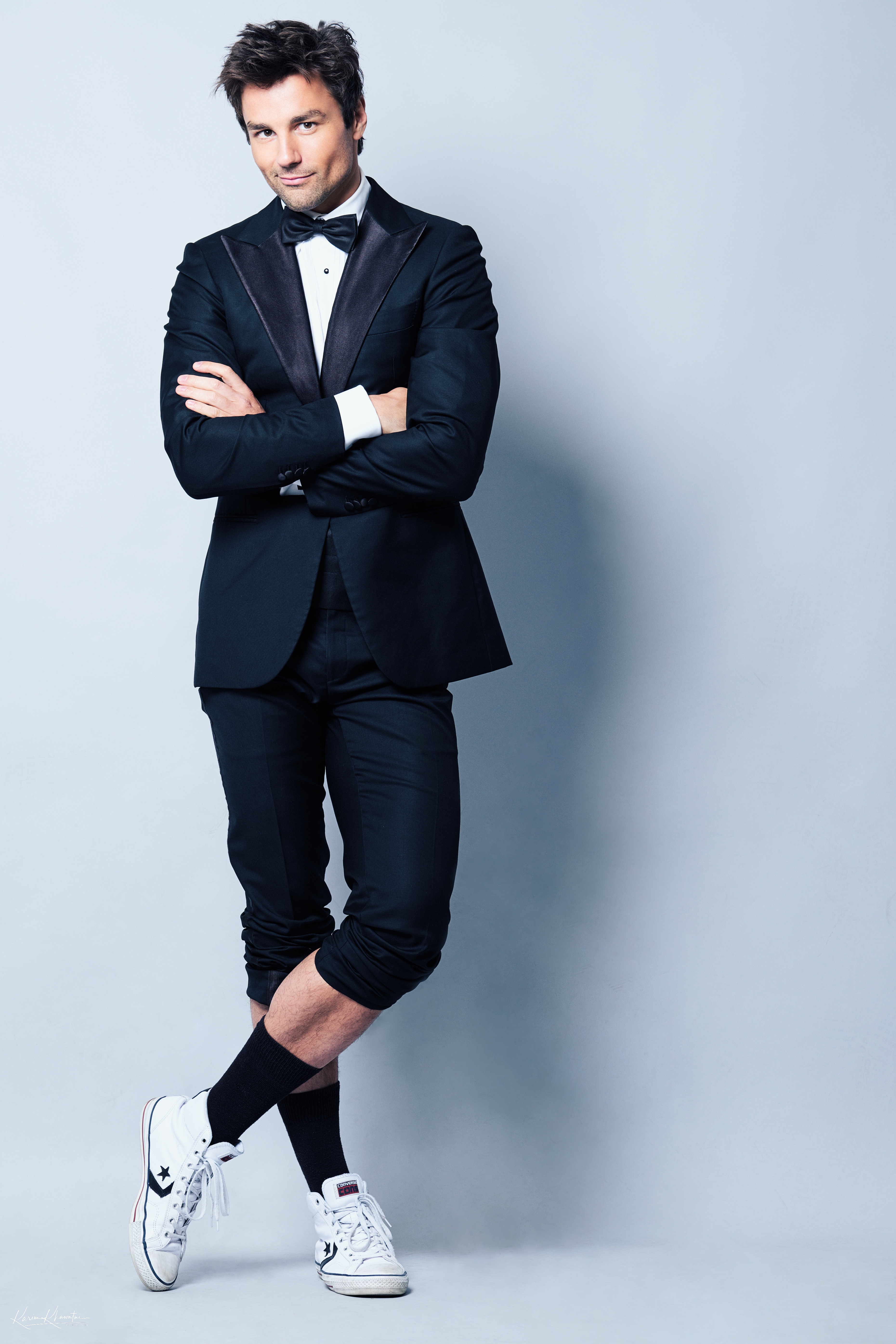 Bild von seinem zweiten Comedy - Programm "Ein bisschen Lars muss sein" (Foto von Karim Khawatmi)